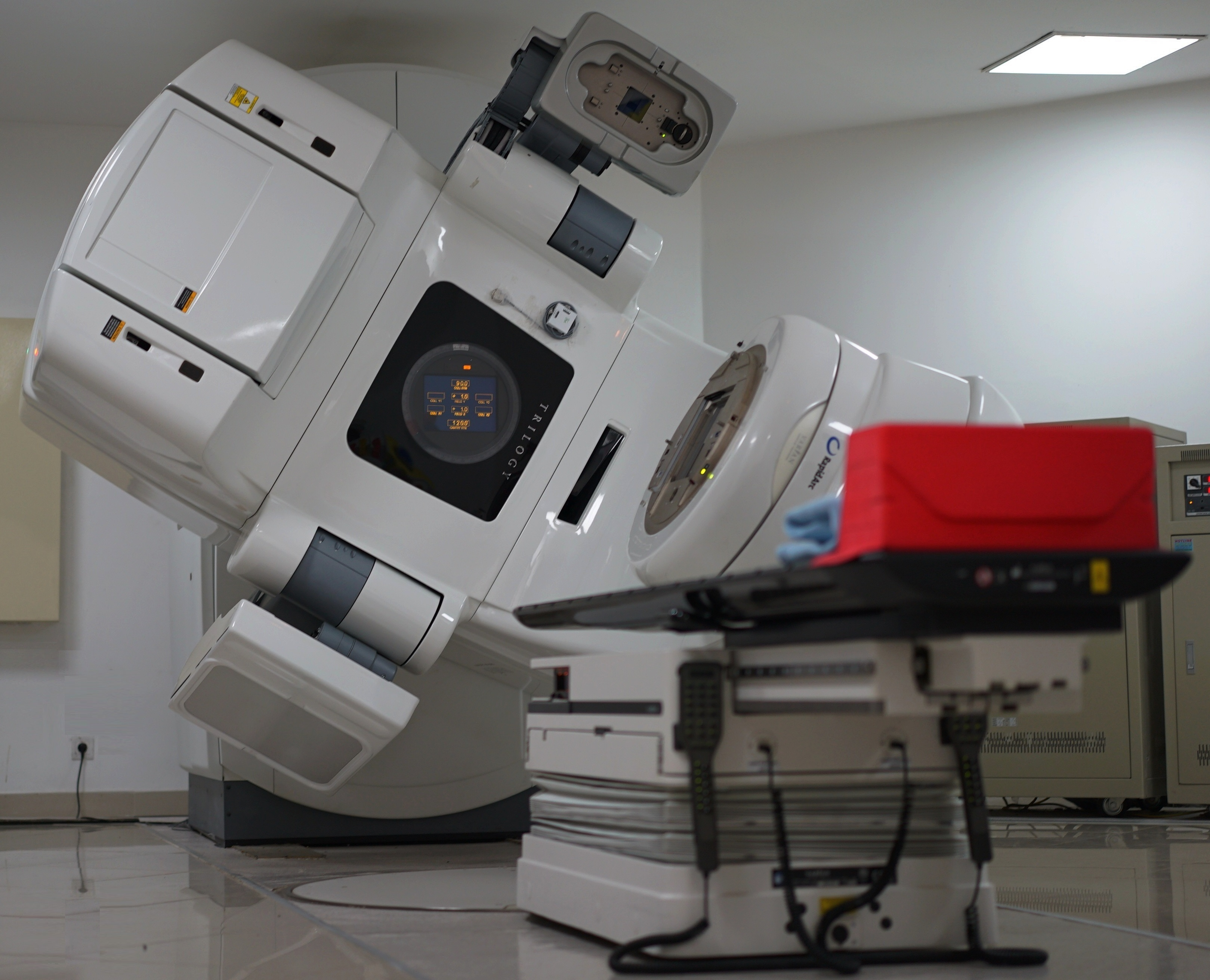 Linac pembangkit radiasi untuk radioterapi